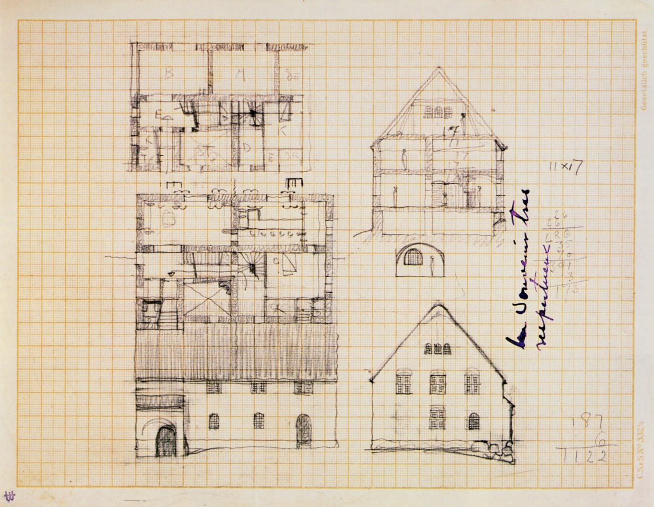 Originalskiss till "Villa Lagerkantz" i Danderyd